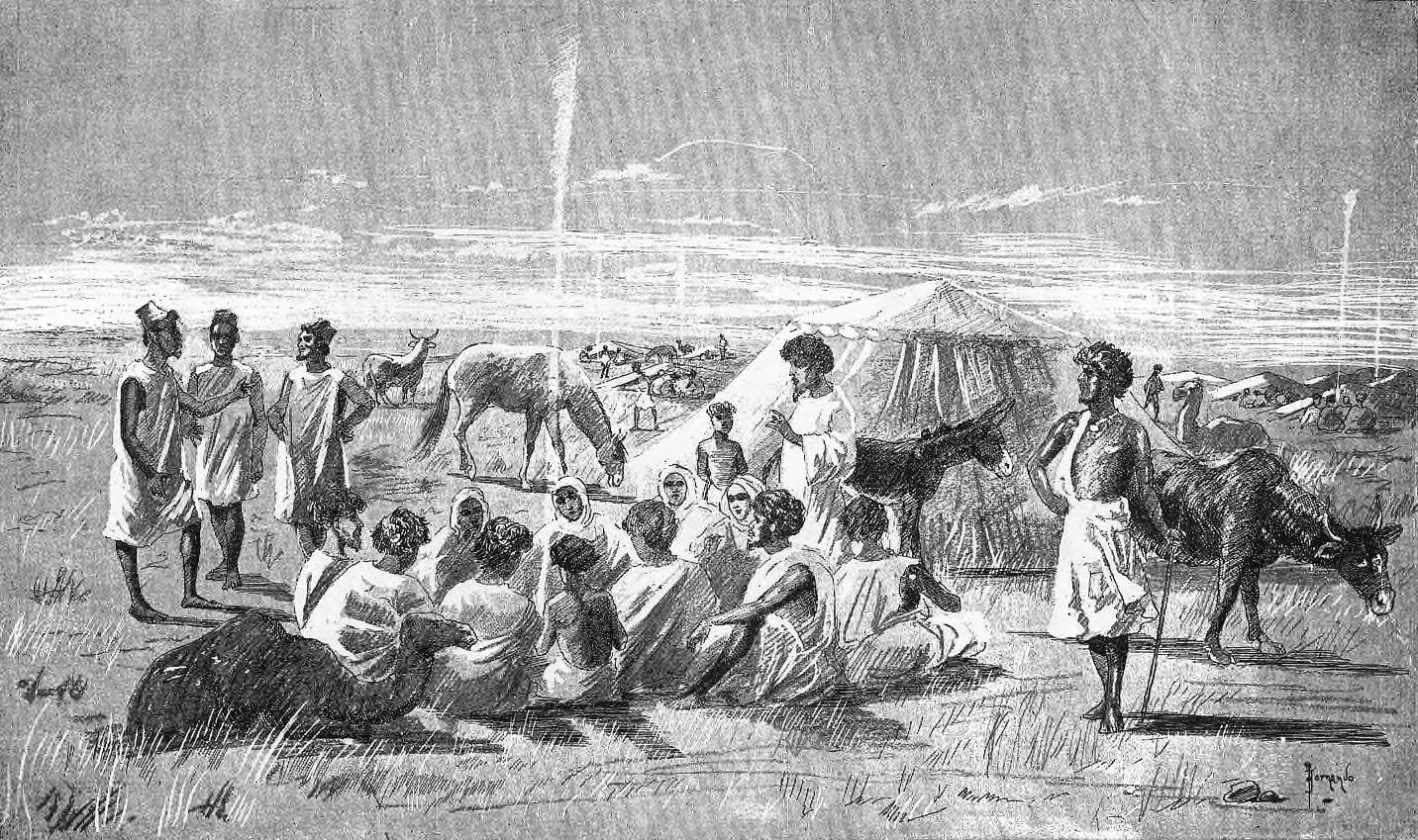 Maures traitant de la gomme à l'escale de Bakel (illustration de Côte occidentale d'Afrique du Colonel Frey, pl. en reg. p. 100)